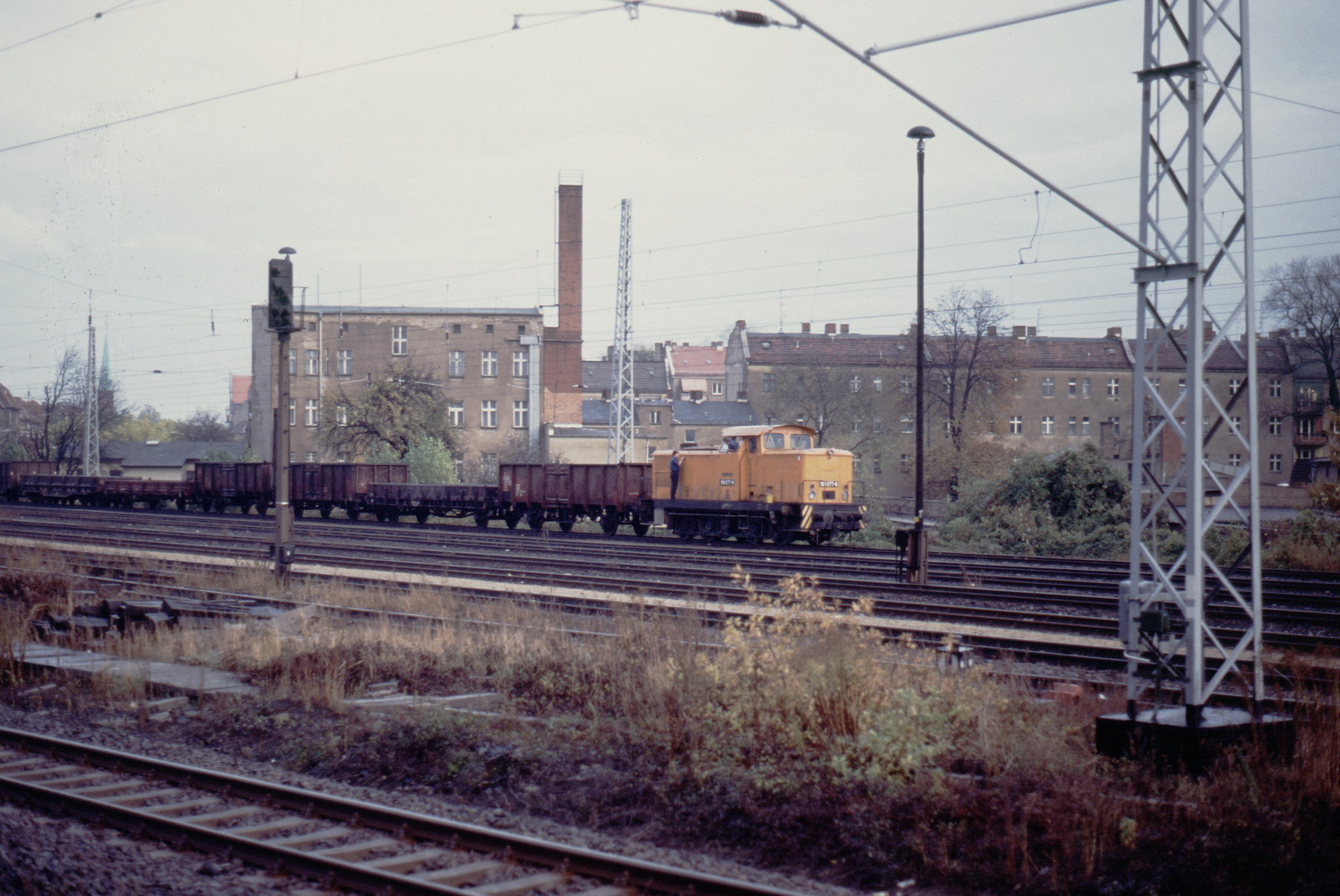 Rangierbahnhof Berlin-Pankow